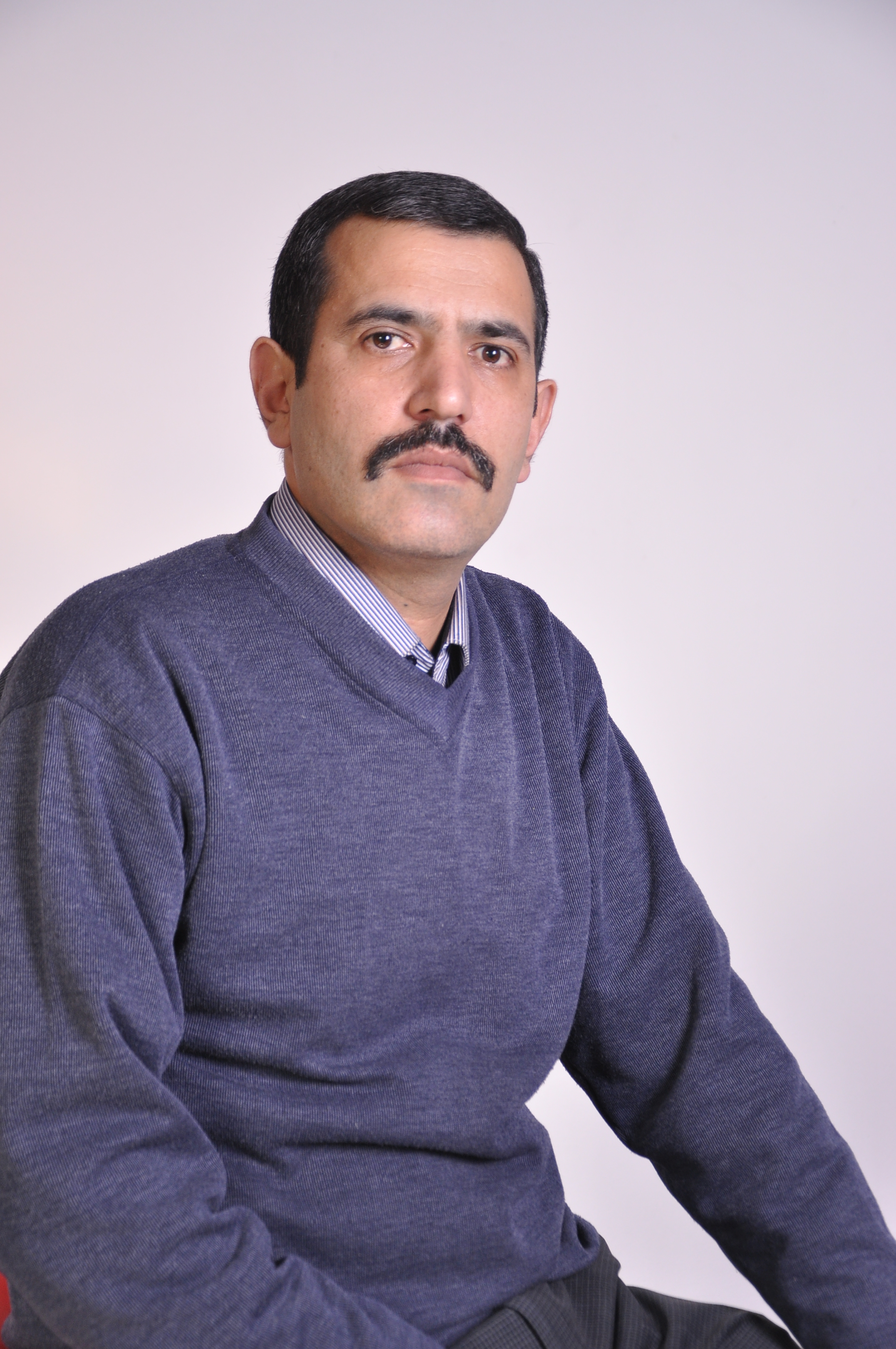 Araz Yaquboğlu (tam adı: Hacıyеv Araz Yaqub оğlu) — tədqiqatçı, şair, "Qızıl qələm" (2011) mükafatı laureatı.